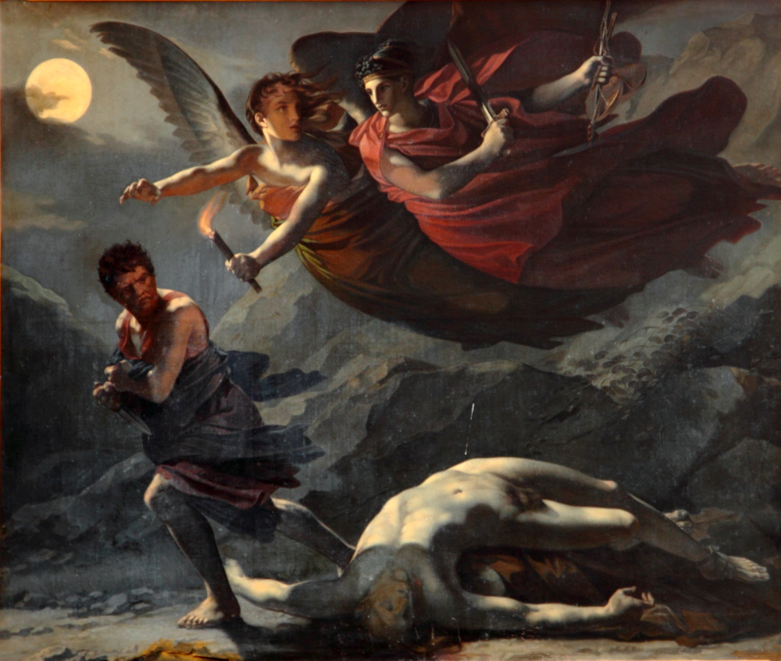 Palais de Justice de Toulouse, Peinture